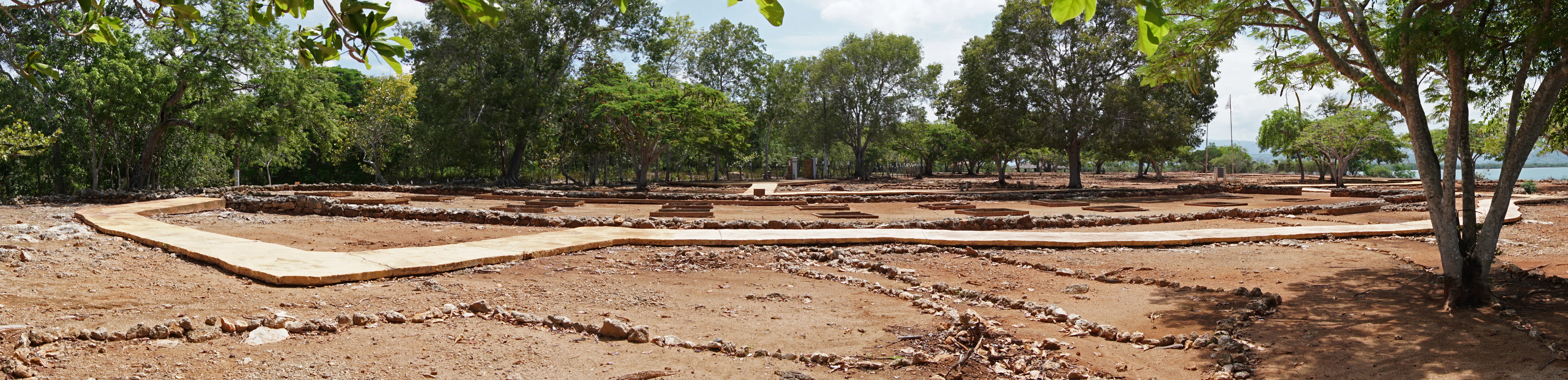 Vista panorámica del Parque Nacional Histórico y Arqueológico de La Isabela, Luperón, República Dominicana